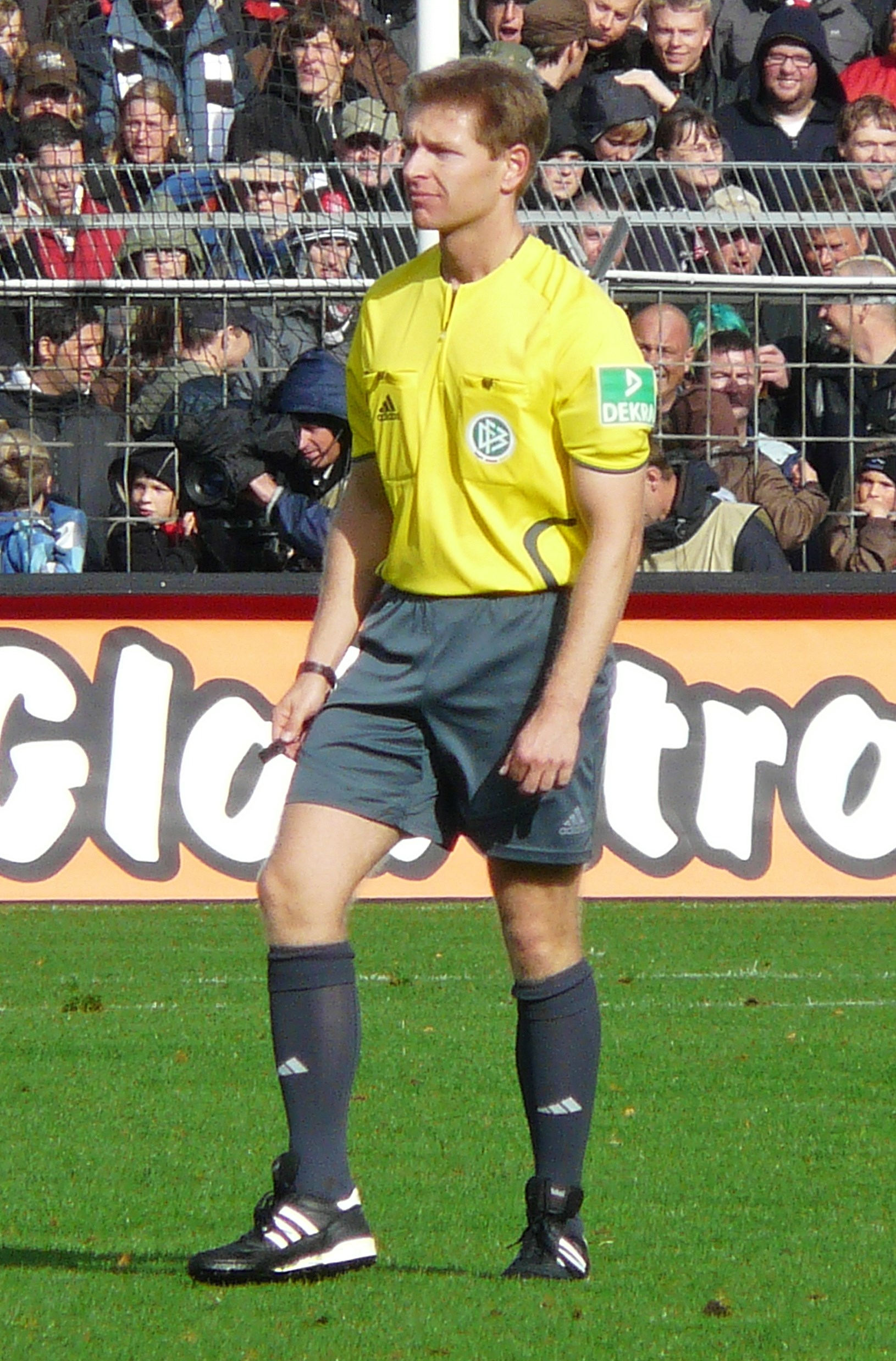 Tobias Welz DFB Schiedsrichter im Millerntorstadion